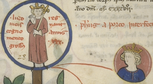 Toulouse, Bibliothèque municipale MS 450: Bernard Gui, De origine prima Francorum f 190v